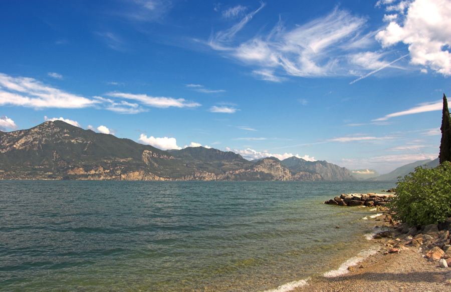 Il lago di Garda